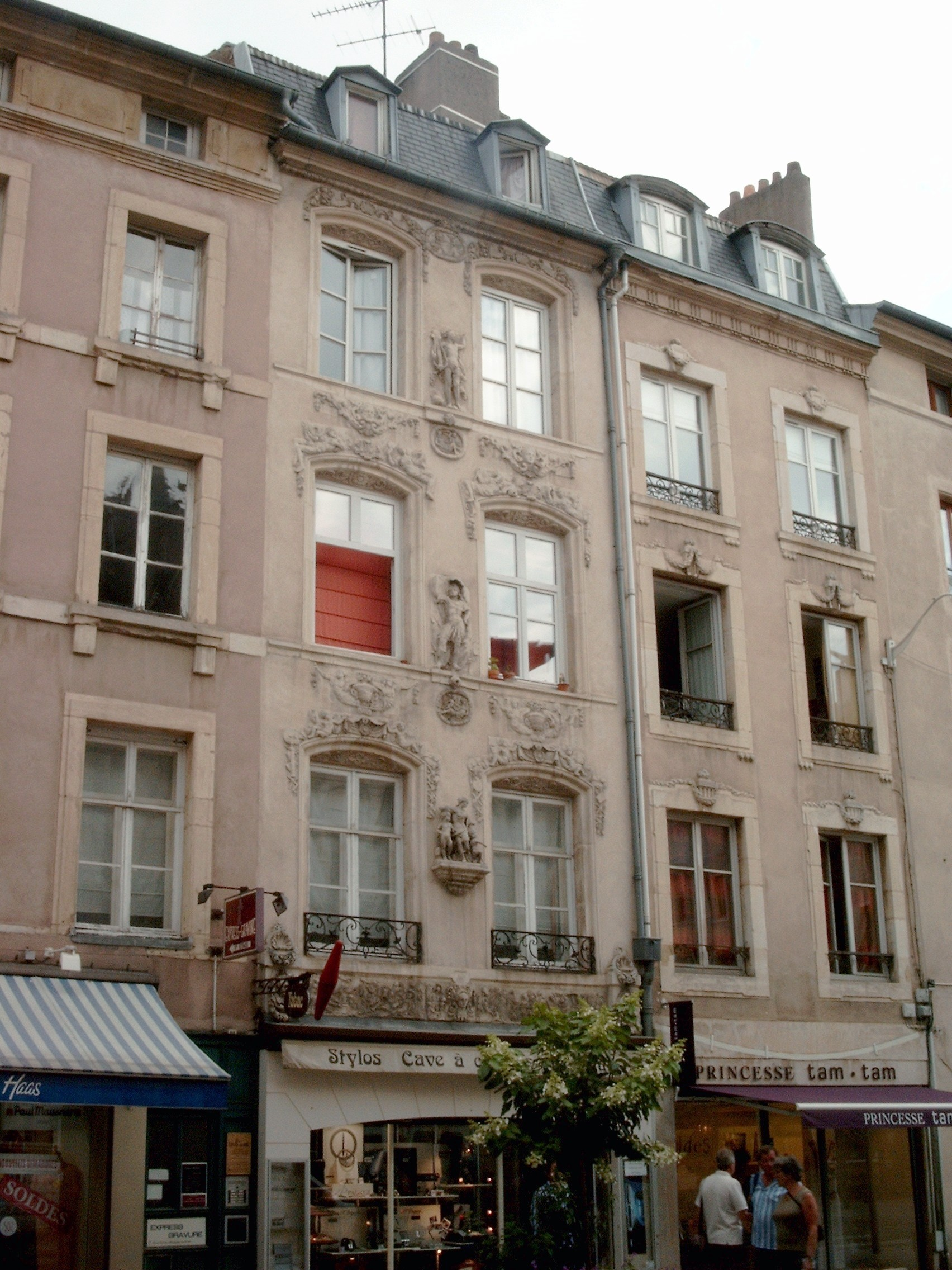 La Maison des Adam à Nancy, famille de sculpteurs